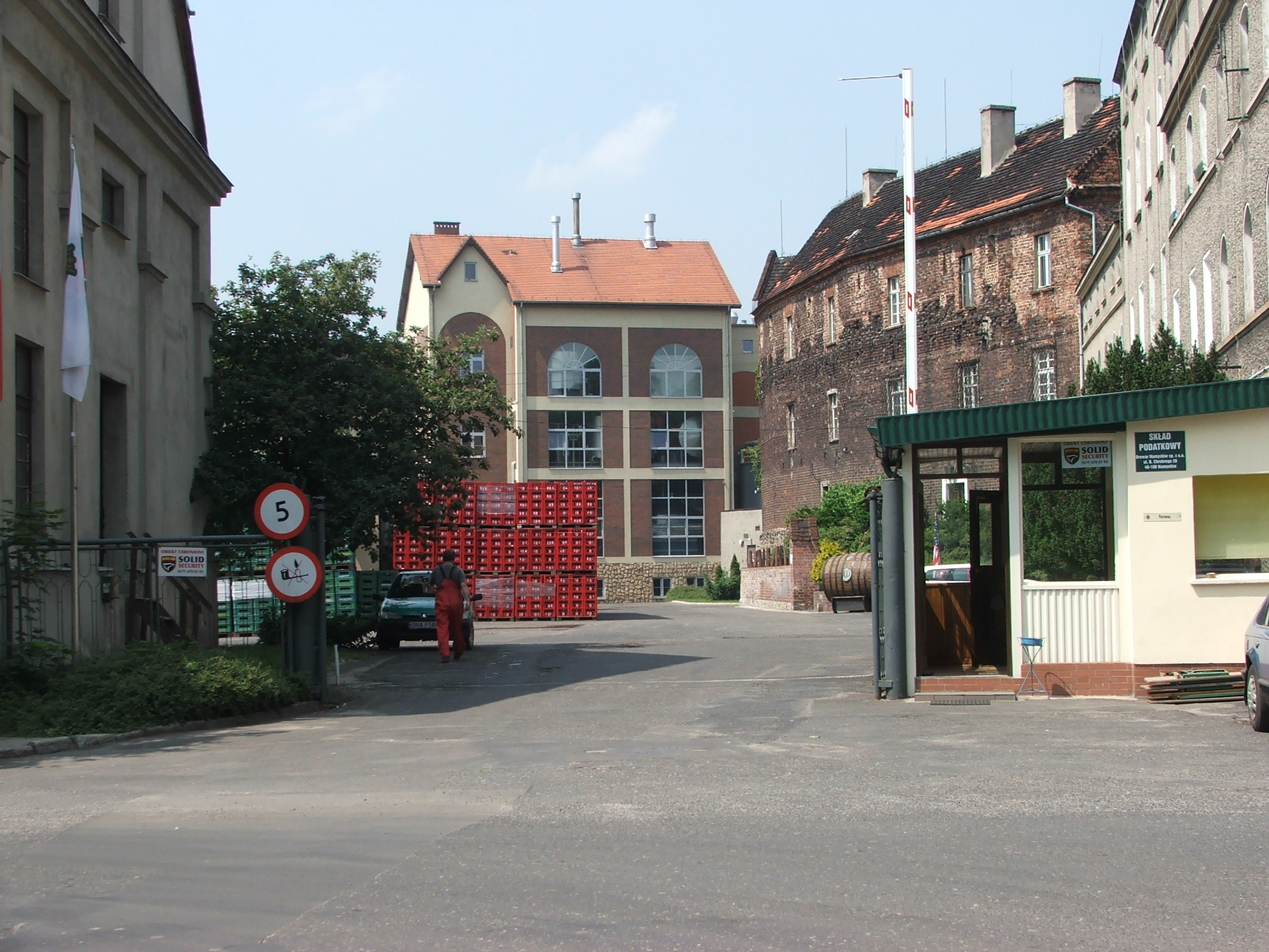 Wjazd do Browaru Namysłów